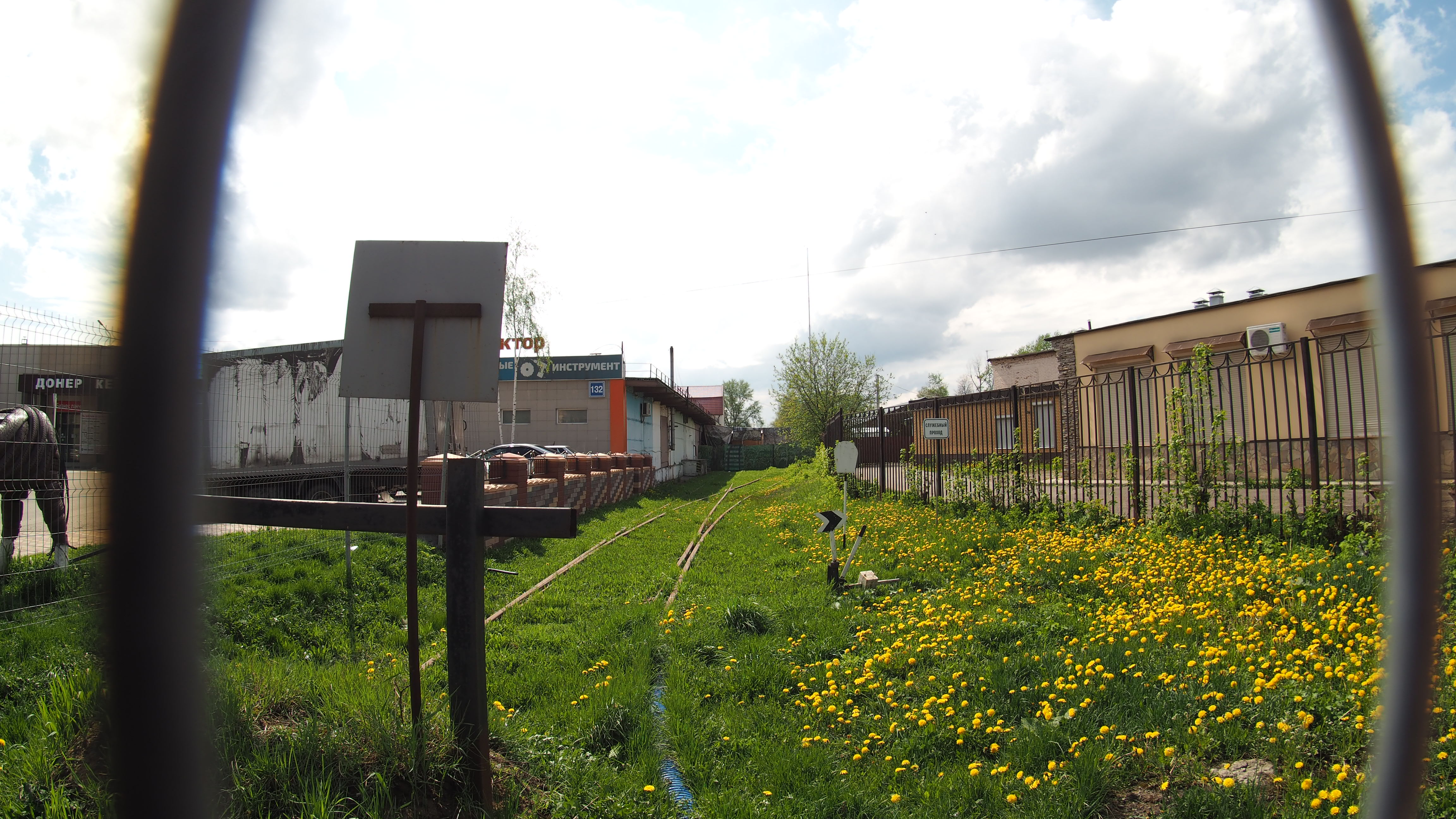 заброшенные подъездные пути от станции Раменское. Улица Михалевича.